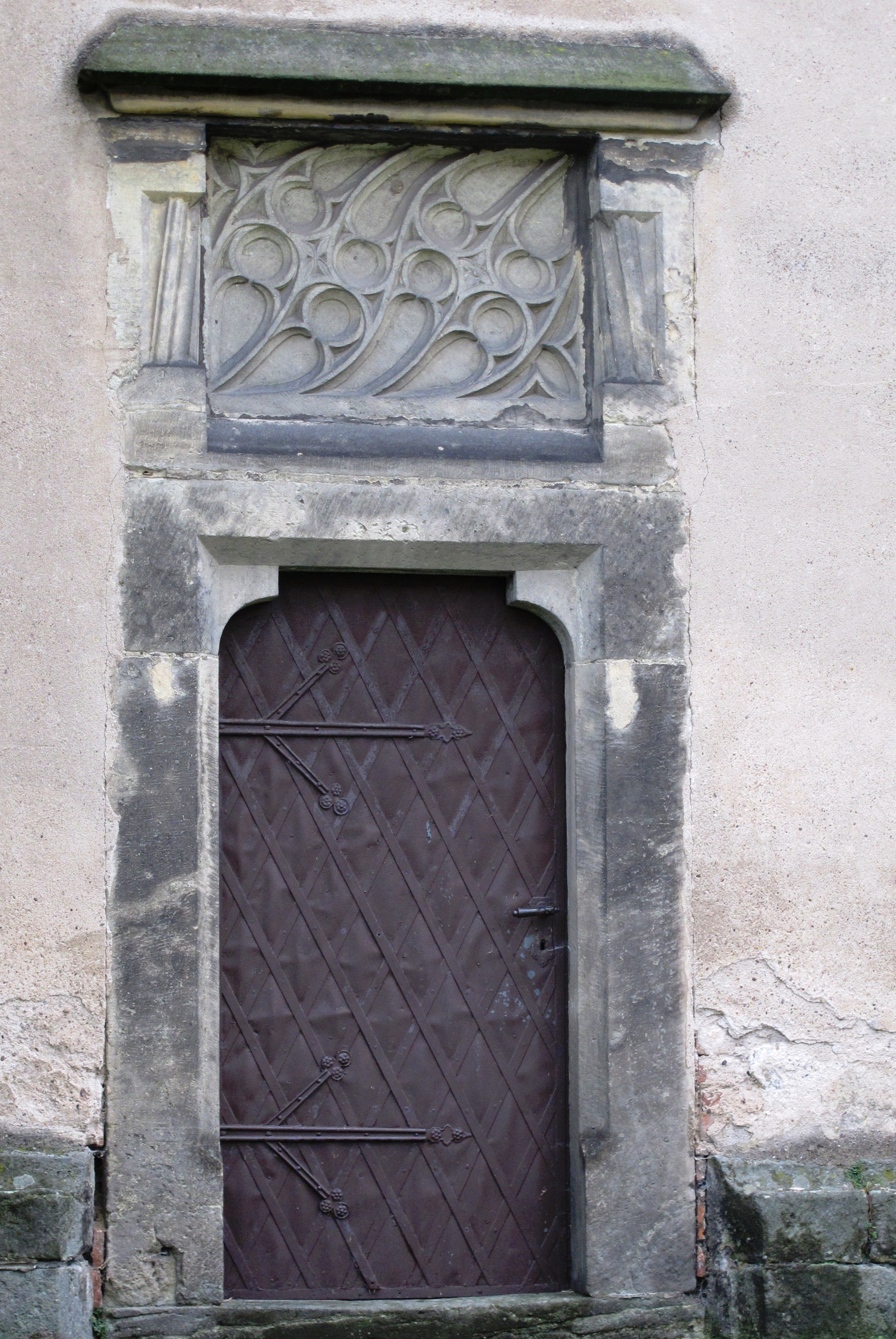 Česky: Chrudim, kostel sv. Kateřiny, jižní portál západního průčelí.